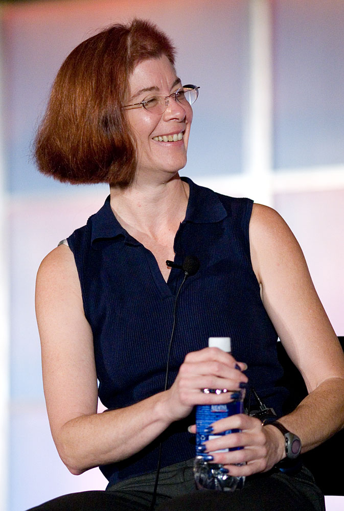 Mitchell Baker na OSCON 2005.